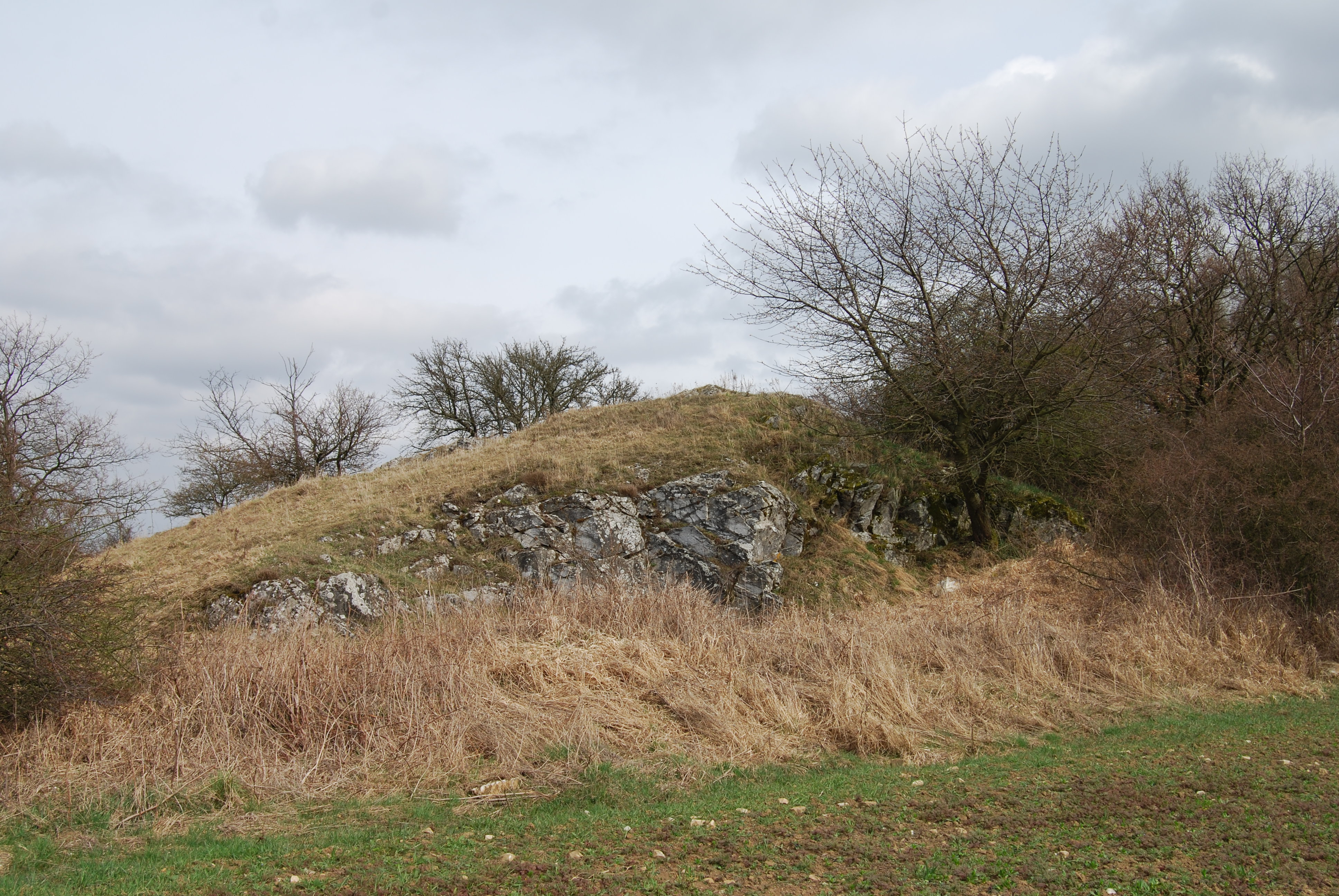 Pahorek v polích nedaleko od kamenného kříže u odbočky z obce směrem k Tisovnici, u autobusové zastávky.Týnčany je malá vesnice, část obce Petrovice v okrese Příbram. Česká republika.